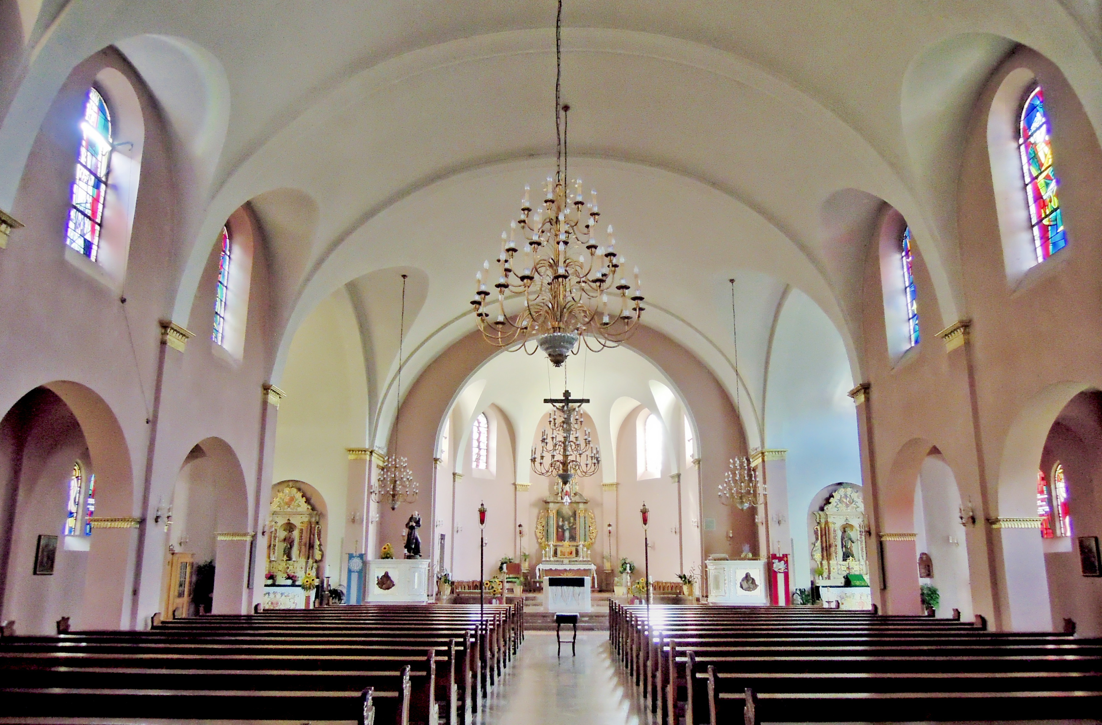 Pater-Nilles-Straße, kath. Pfarrkirche St. Konrad, 1934–36 von Josef Monz (Einzeldenkmal)